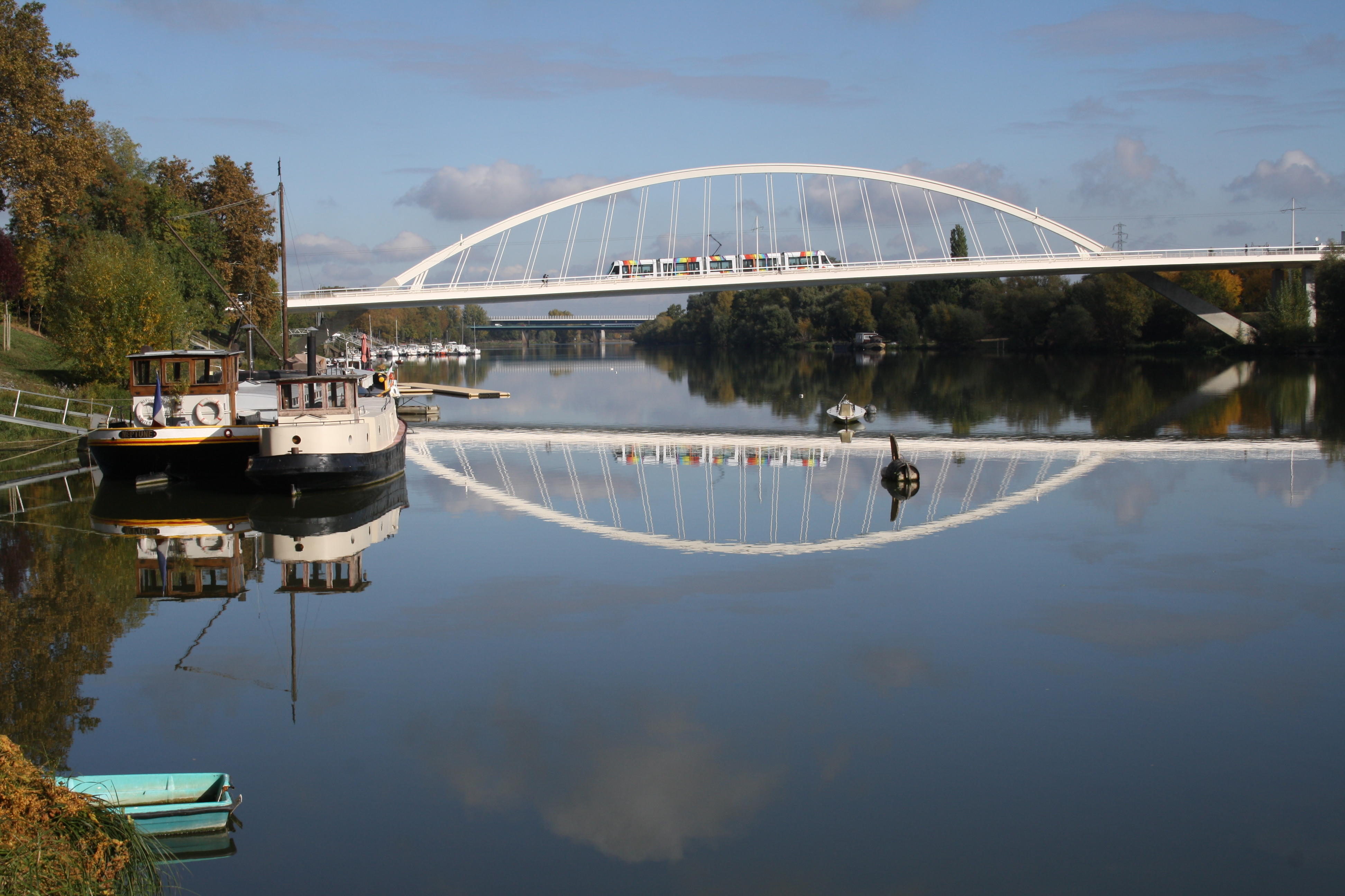 Der Pont Confluances in Angers